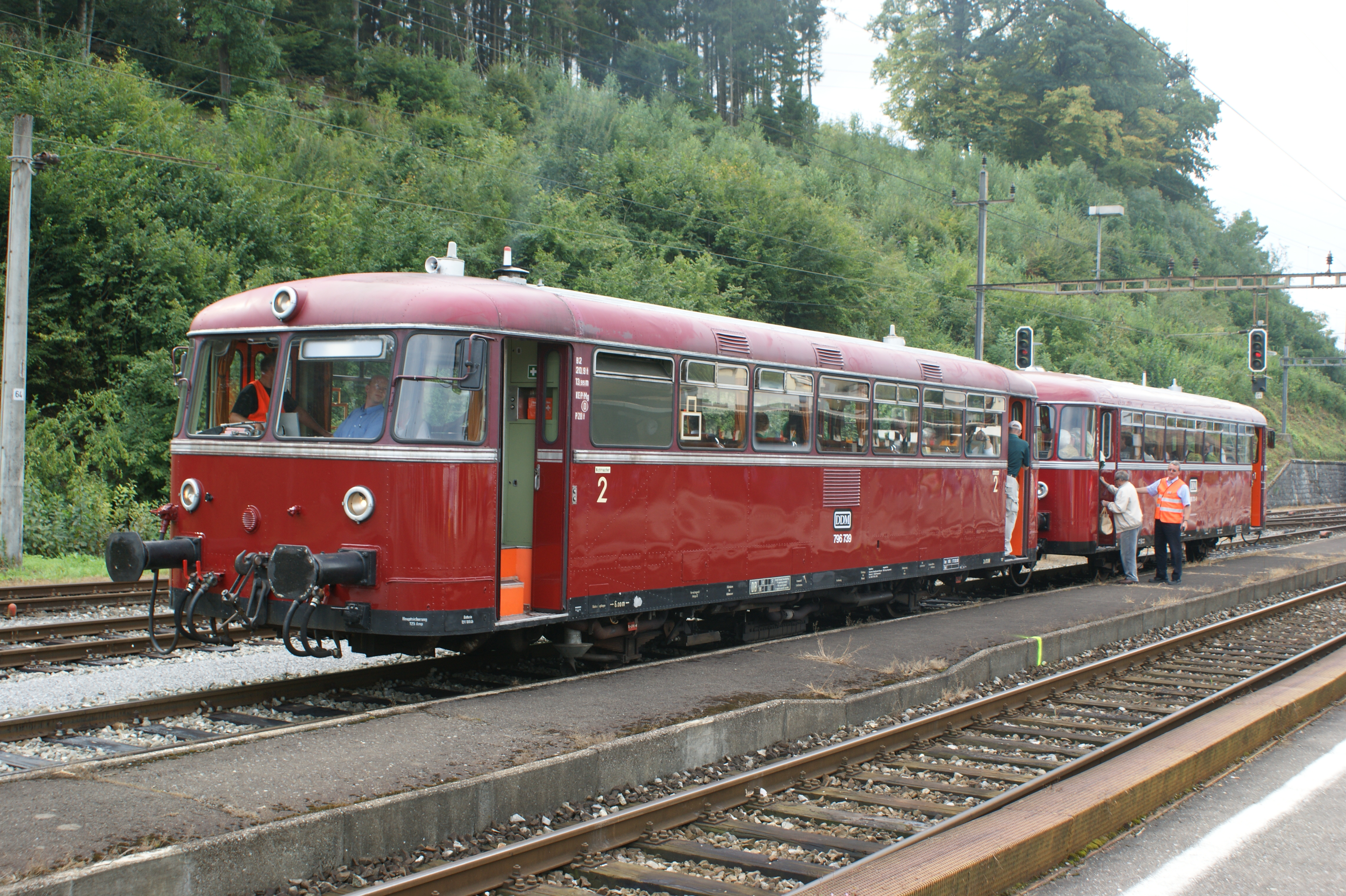 Uerdinger Schienenbus in Koblenz, Kanton Aargau, Schweiz.